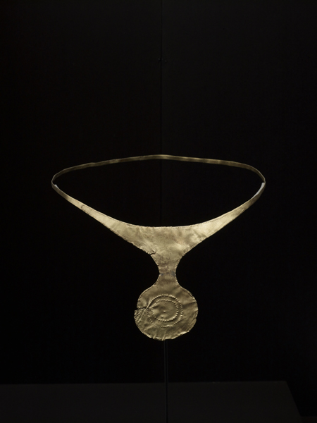 Diadema de Caravaca de la Cruz (Cultura del Argar). Número de inventario: 33114.